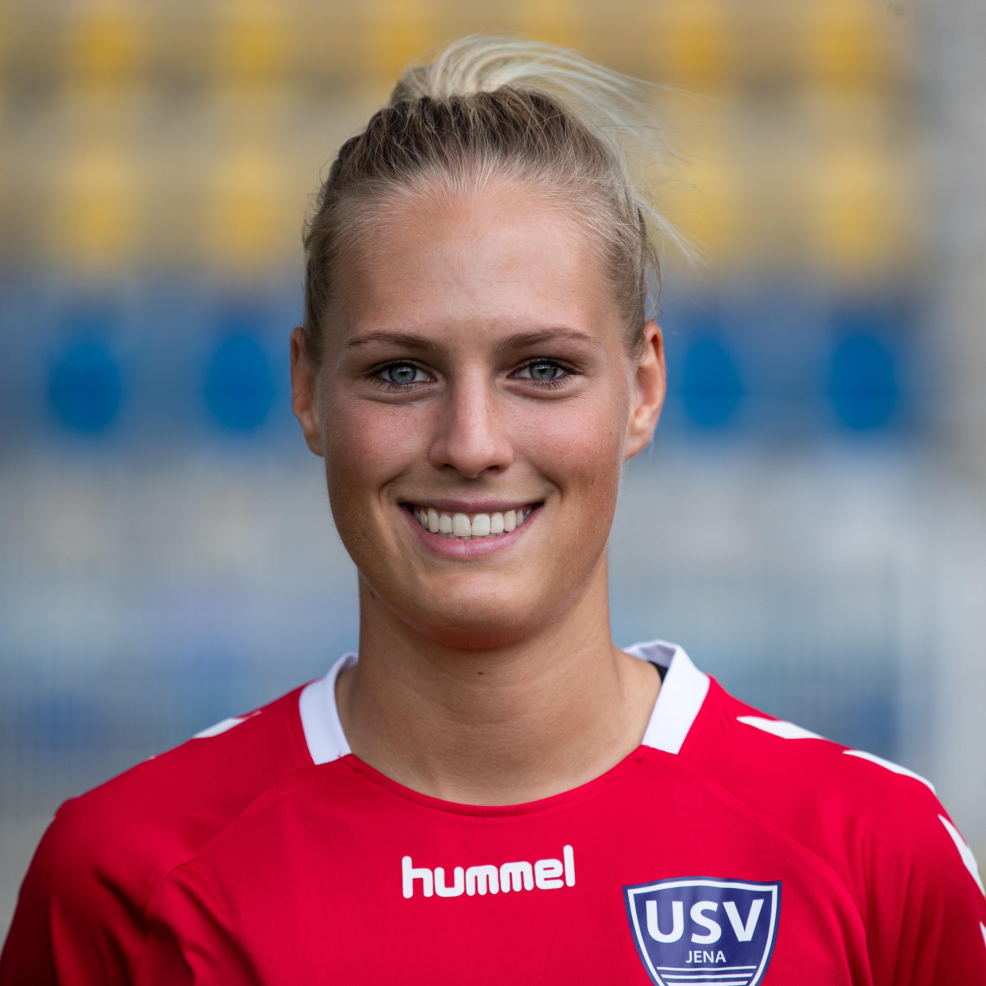 Fußball, Flyeralarm Frauen-Bundesliga, Mannschaftsfotos FF USV Jena; Inga Schuldt (FF USV Jena, 31, Torwart); Porträt, Einzelbild